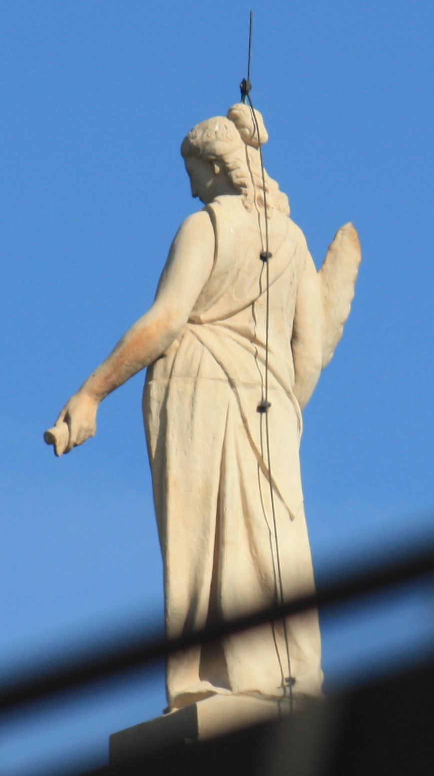 Statue auf dem Bayerischen Landtag